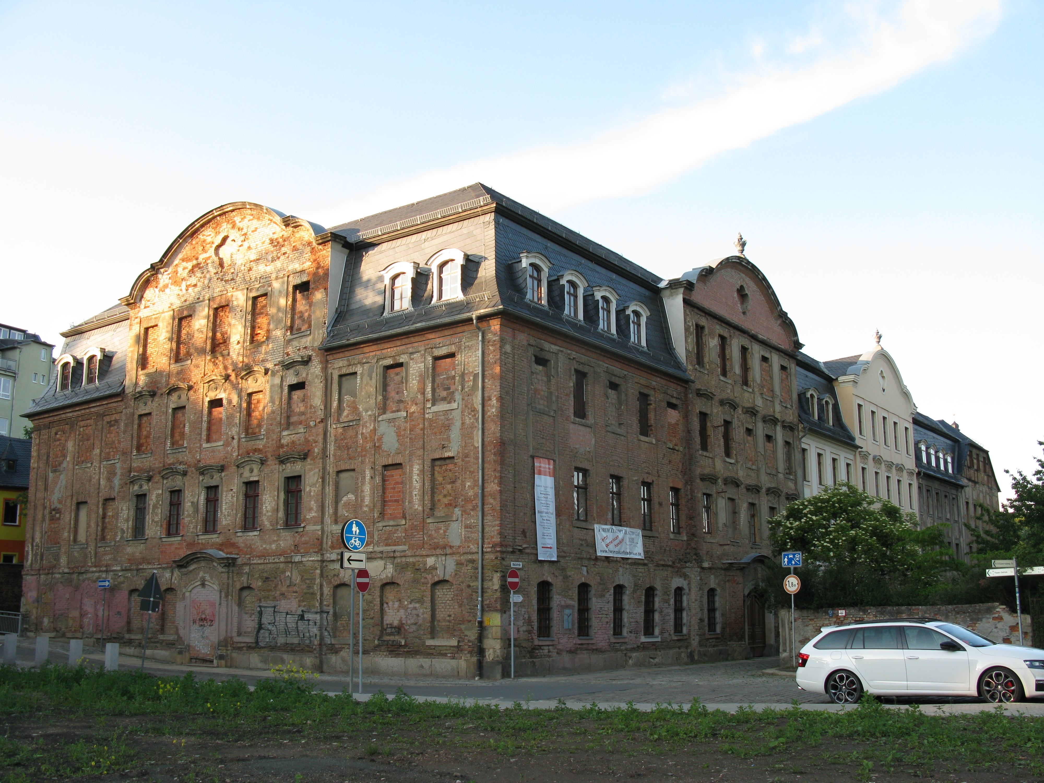 Plauen, denkmalgeschütztes Weisbachsches Haus in der Bleichstraße (Bleichstraße 1 - 7).